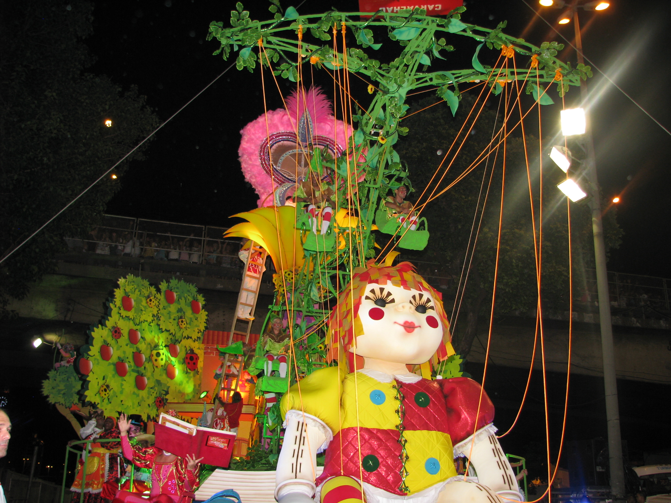 GRES Acadêmicos do Salgueiro Carnaval 2010 052